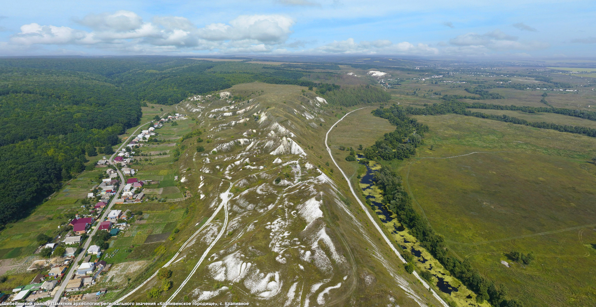 Крапивенское городище. Белгородская область.